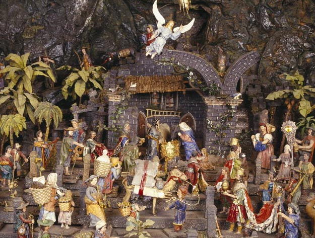 Stred